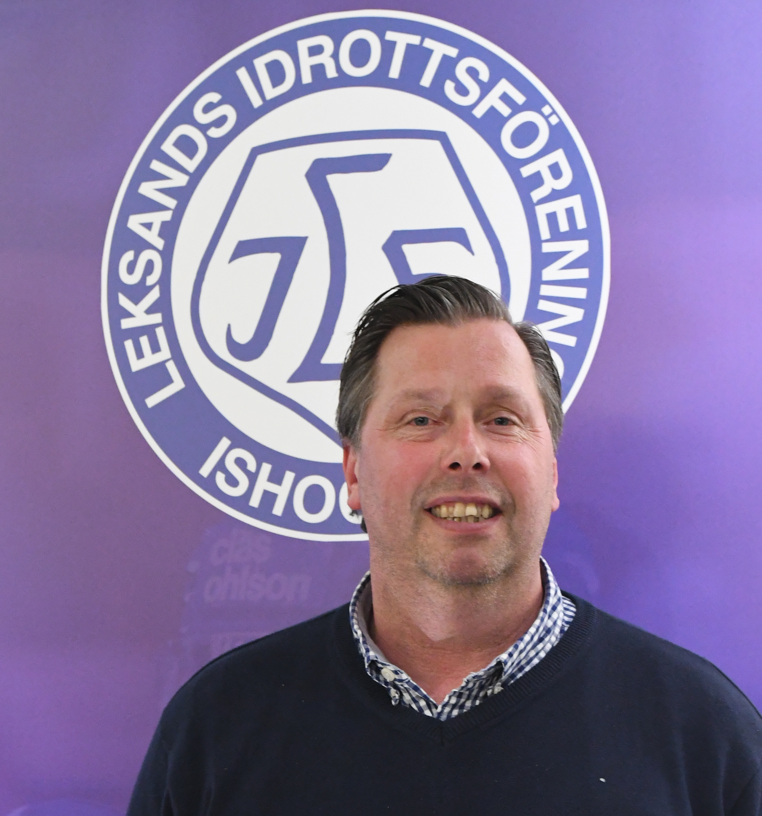 Leksands IF on Tour 2019 på besök i Stockholm. Thomas Johansson, General manager för Leksands IF.